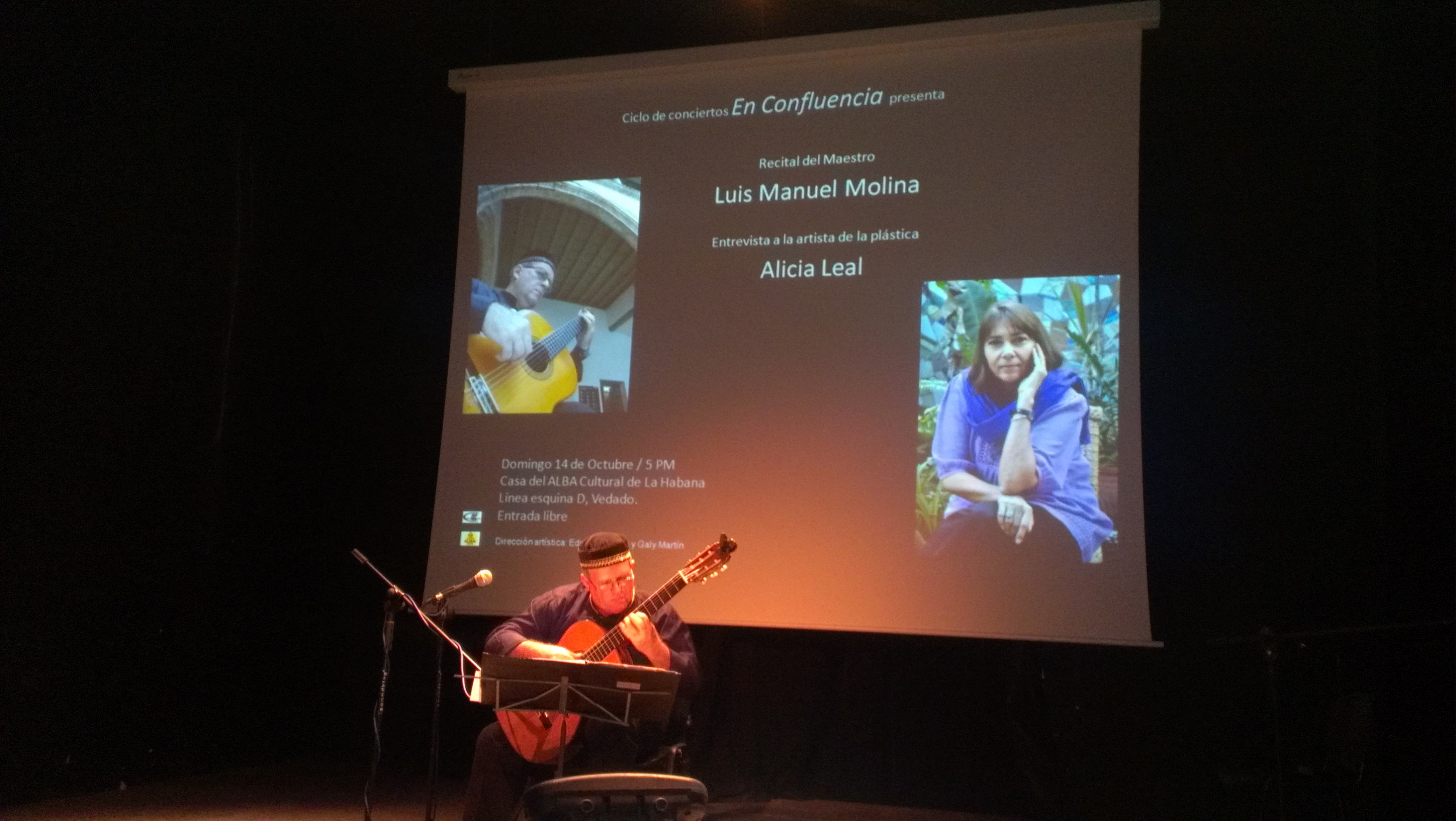 Recital a Eduardo Martín